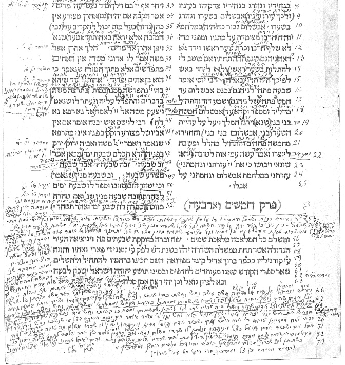 צילום הדף האחרון של הגהות לhe:פרקי דרבי אליעזר, he:ויניציאה ש"ד